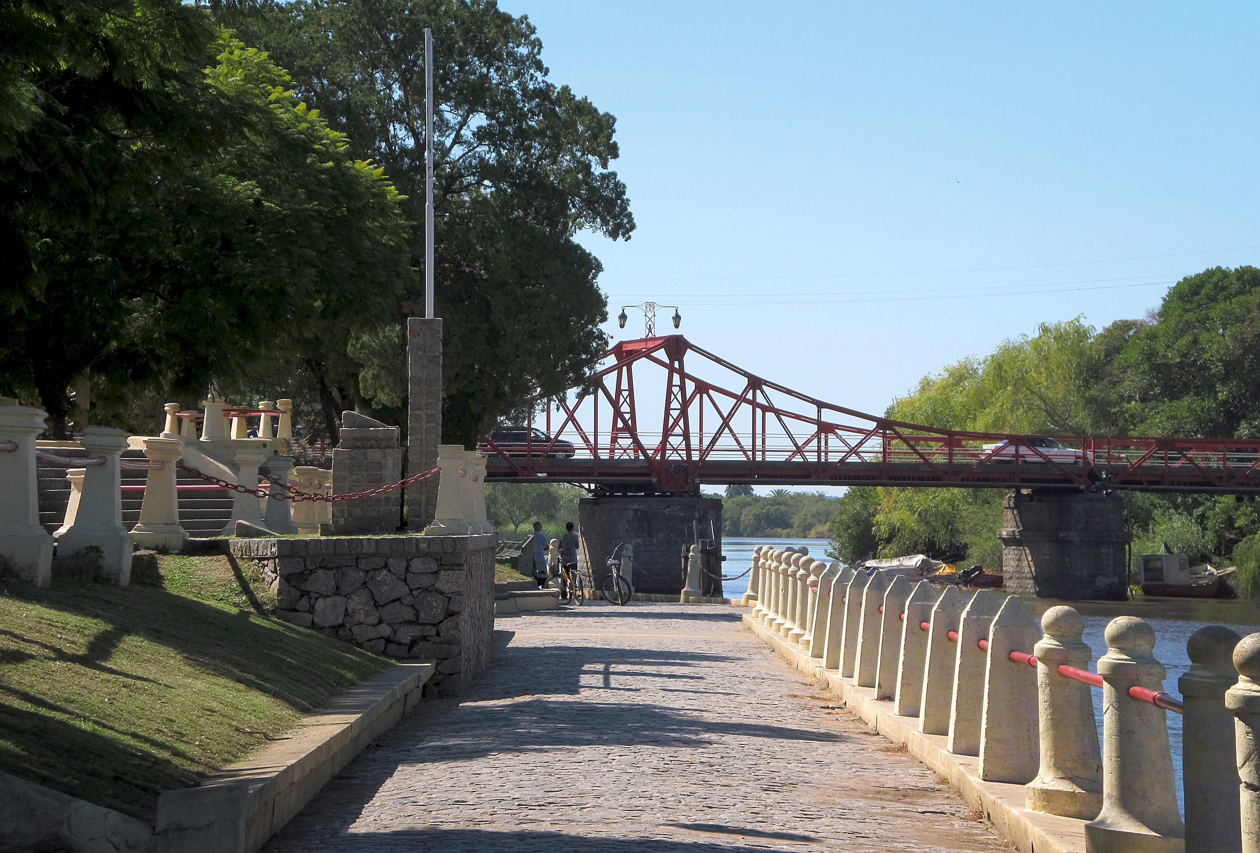 Puente de hierro giratorio. Ubicada en el departamento de Colonia